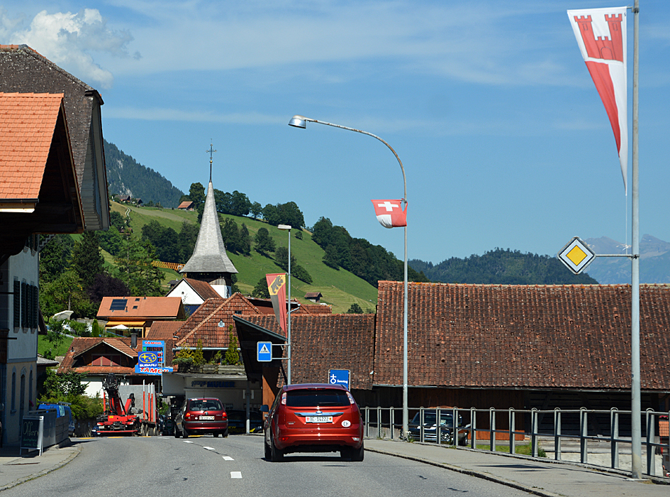 Erlenbach im Simmental, Kanton Bern